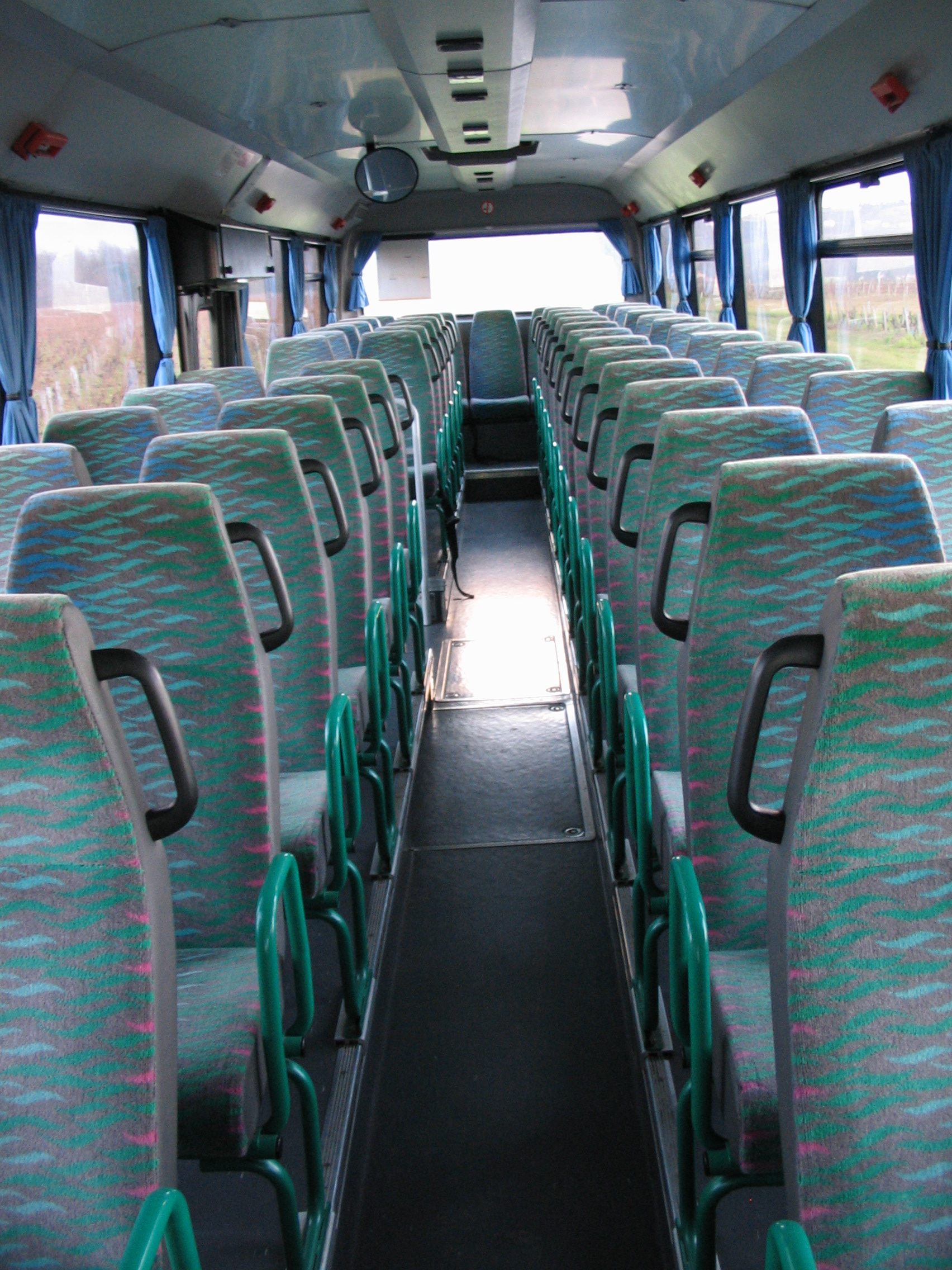 Intérieur Renault Tracer (1999).